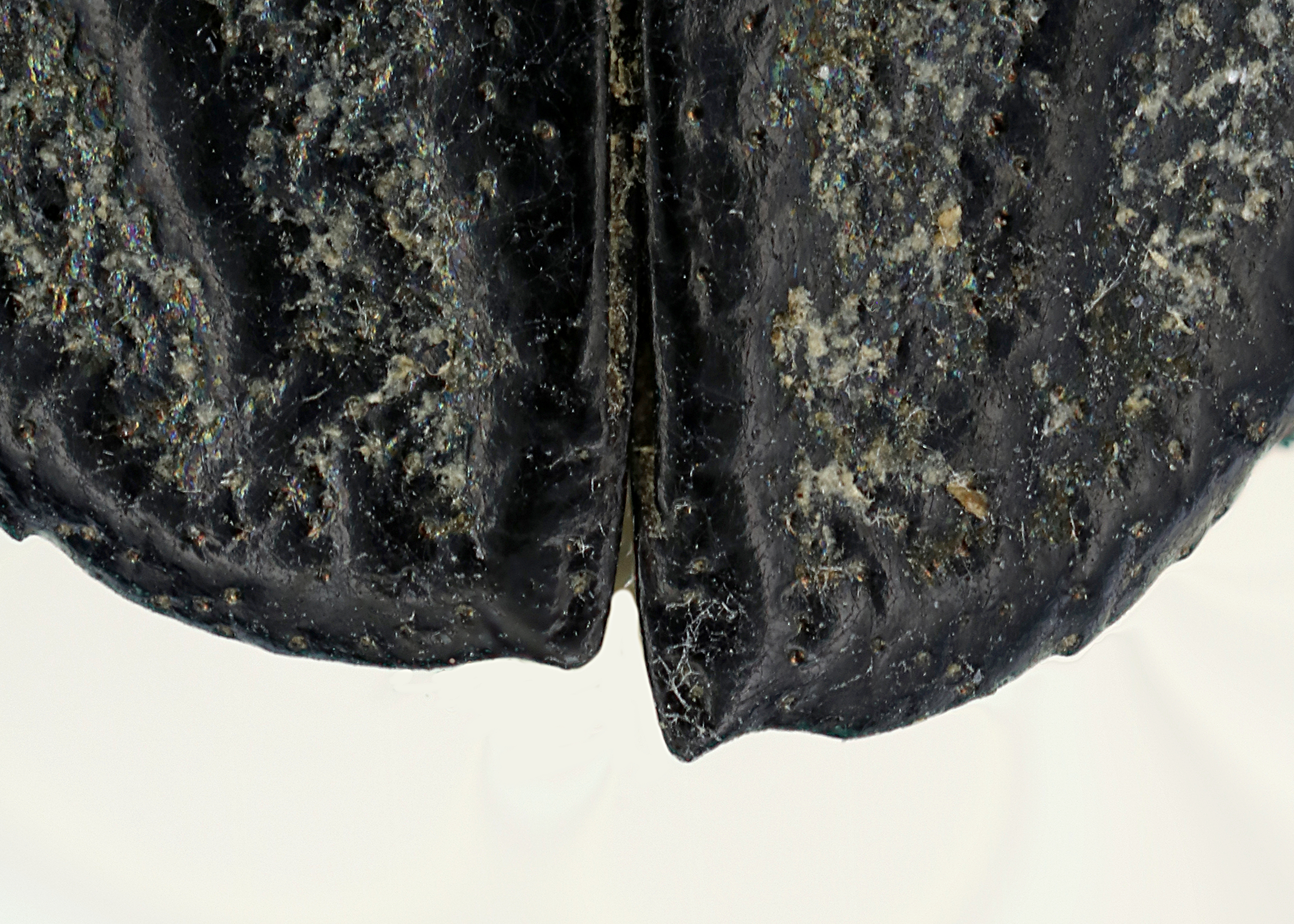 Spitze der Flügeldecken von Chalcophora mariana